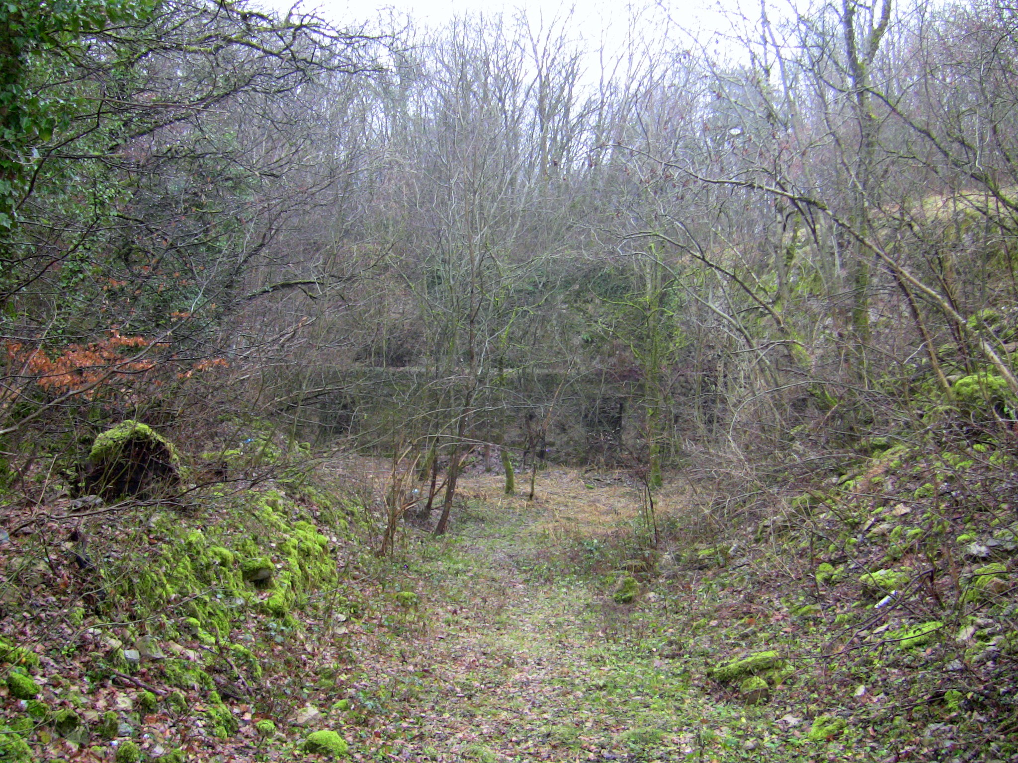 La carriète du fort de Planoise, à Besançon (Doubs, France).